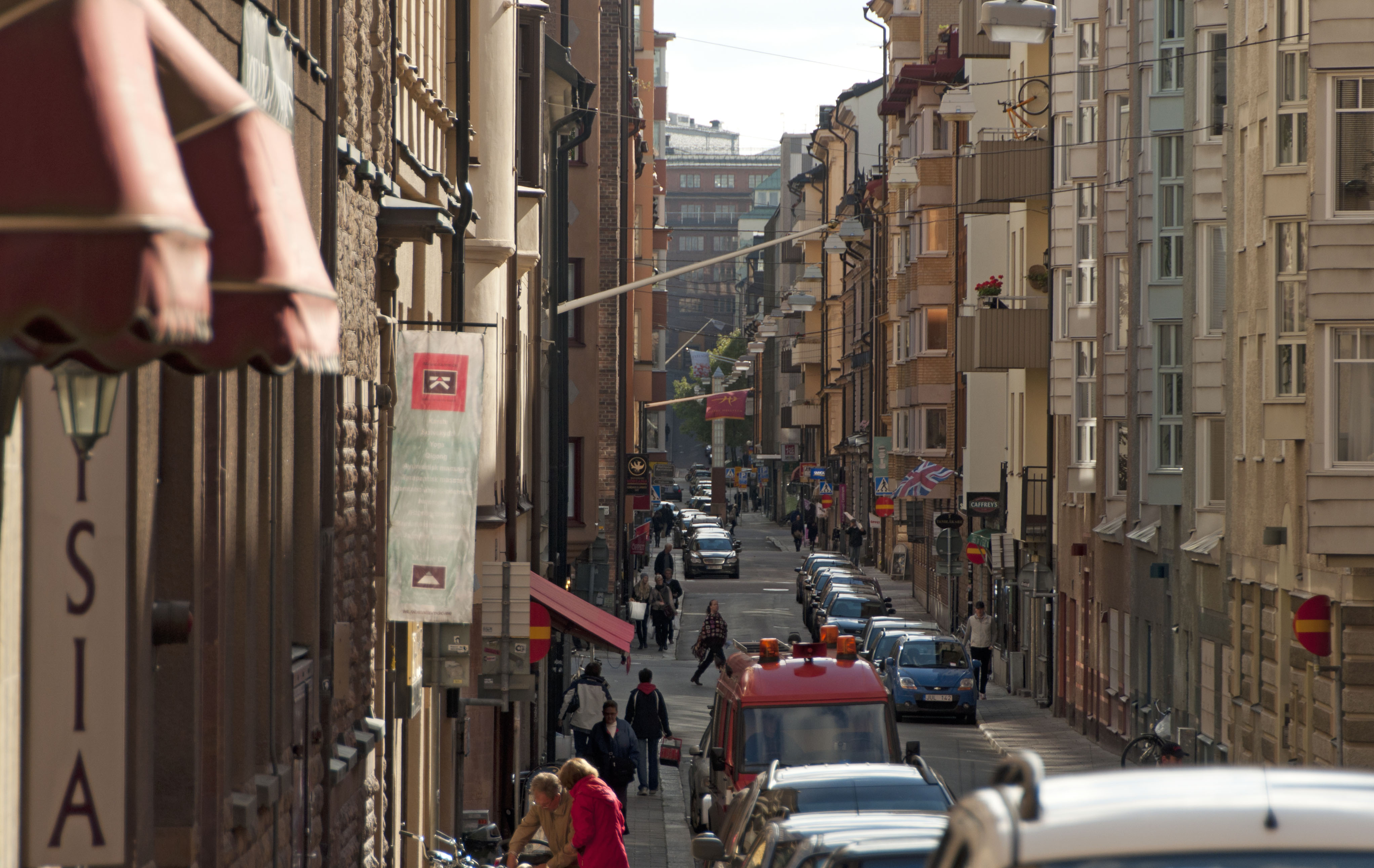 Luntmakargatan söderut, från Odengatan